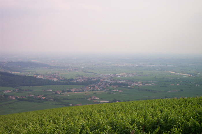 Vista di Illasi dal Monte Garzon